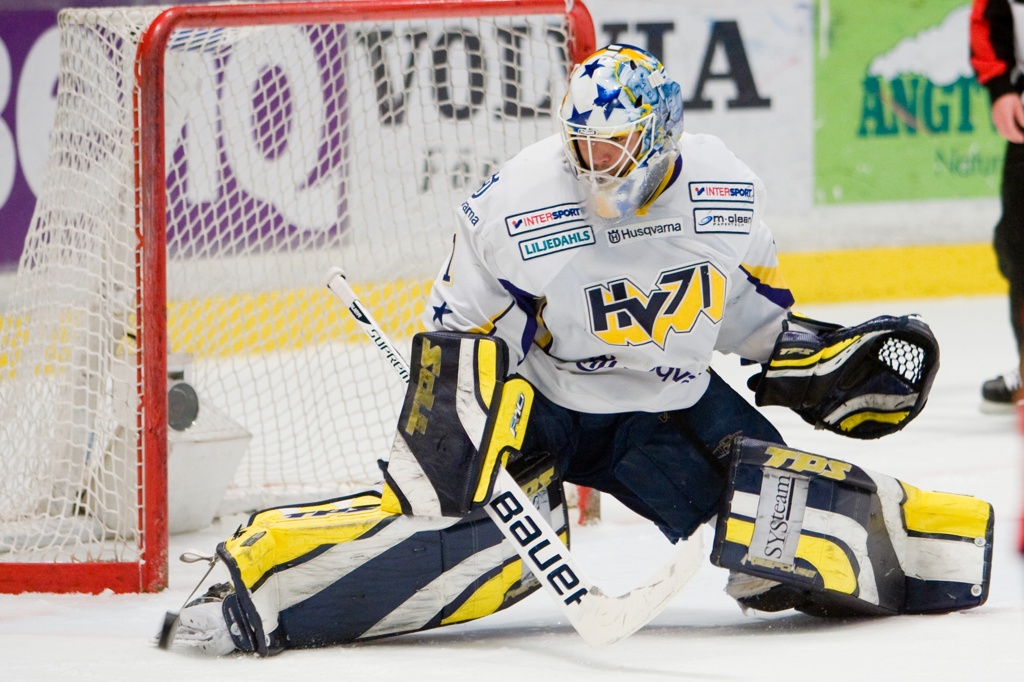 Stefan Liv räddar ett skott i första perioden i den sjätte och sista SM-finalen 2010.